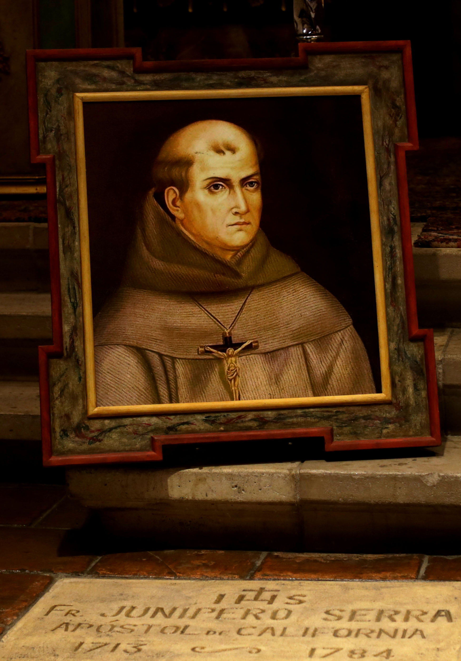 Grab und Bild von Junípero Serra im Altarraum der Kirche San Carlos Borromeo de Carmelo in Carmel-by-the-Sea